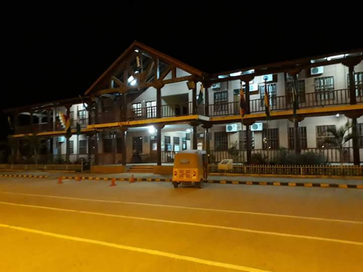 Edificio principal del Gobierno Autonomo Municipal de San Julian